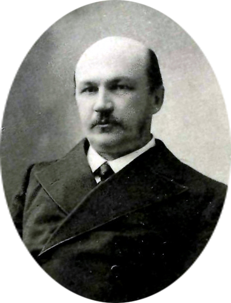 Лейкфельд, Павел Эмильевич